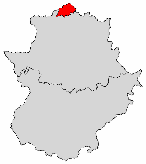 Mapa de situación de la comarca de las Hurdes en el contexto extremeño